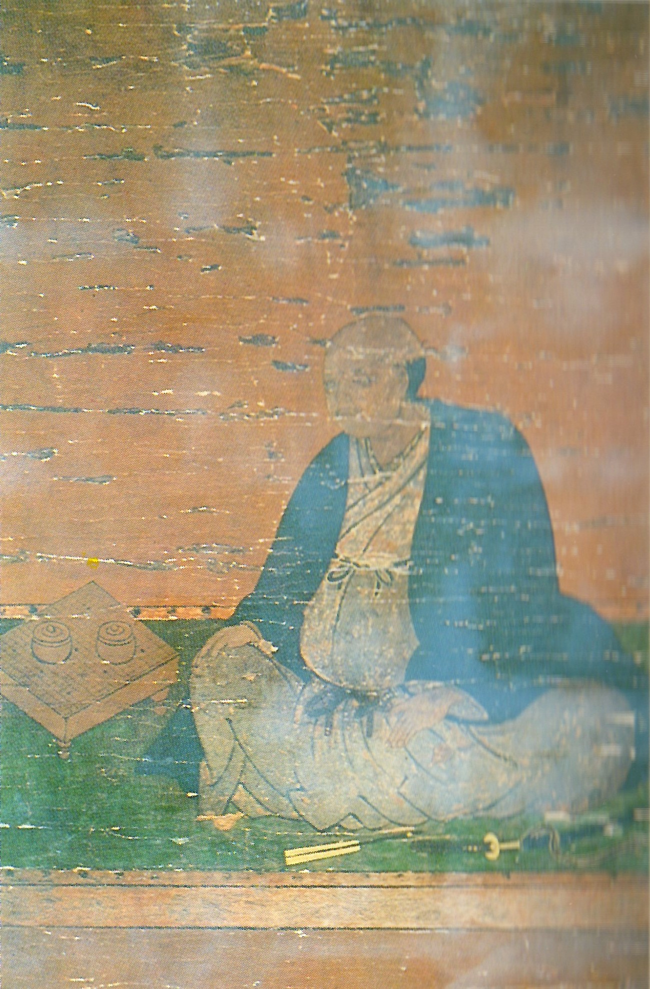 水谷勝隆の肖像。